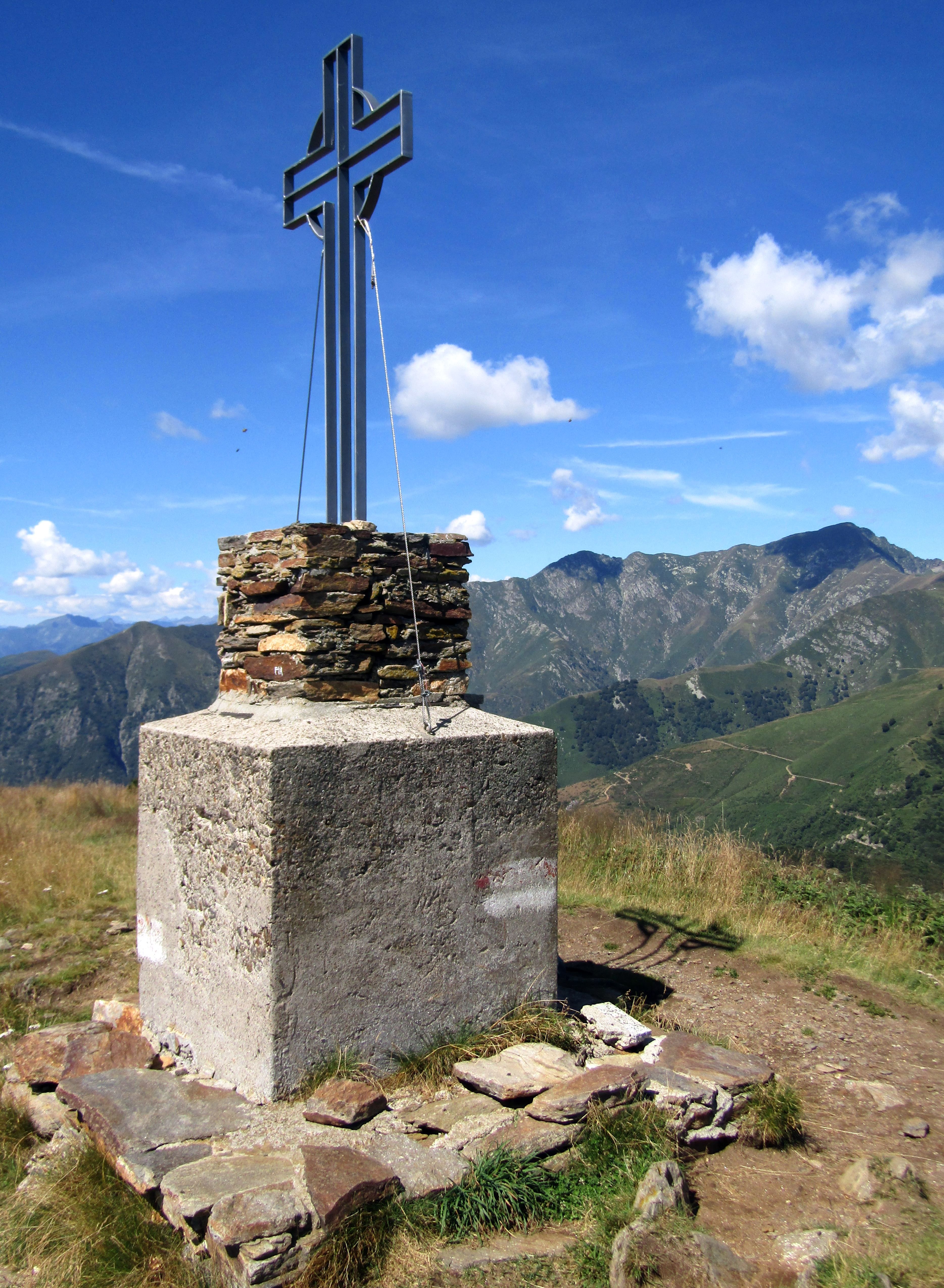 Monte Spalavera (Alpi Lepontine): la croce di vetta, sulla destra il Monte Zeda